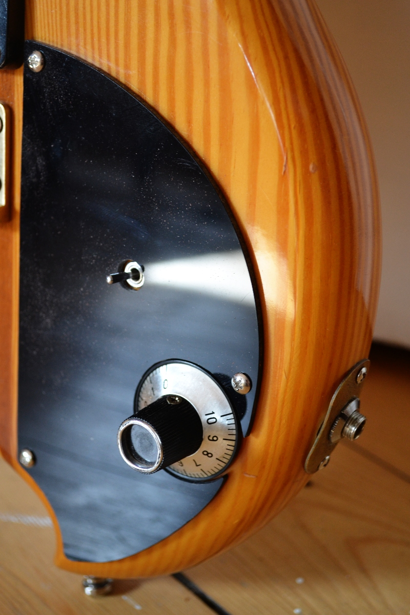 Eko CX7S (1982)